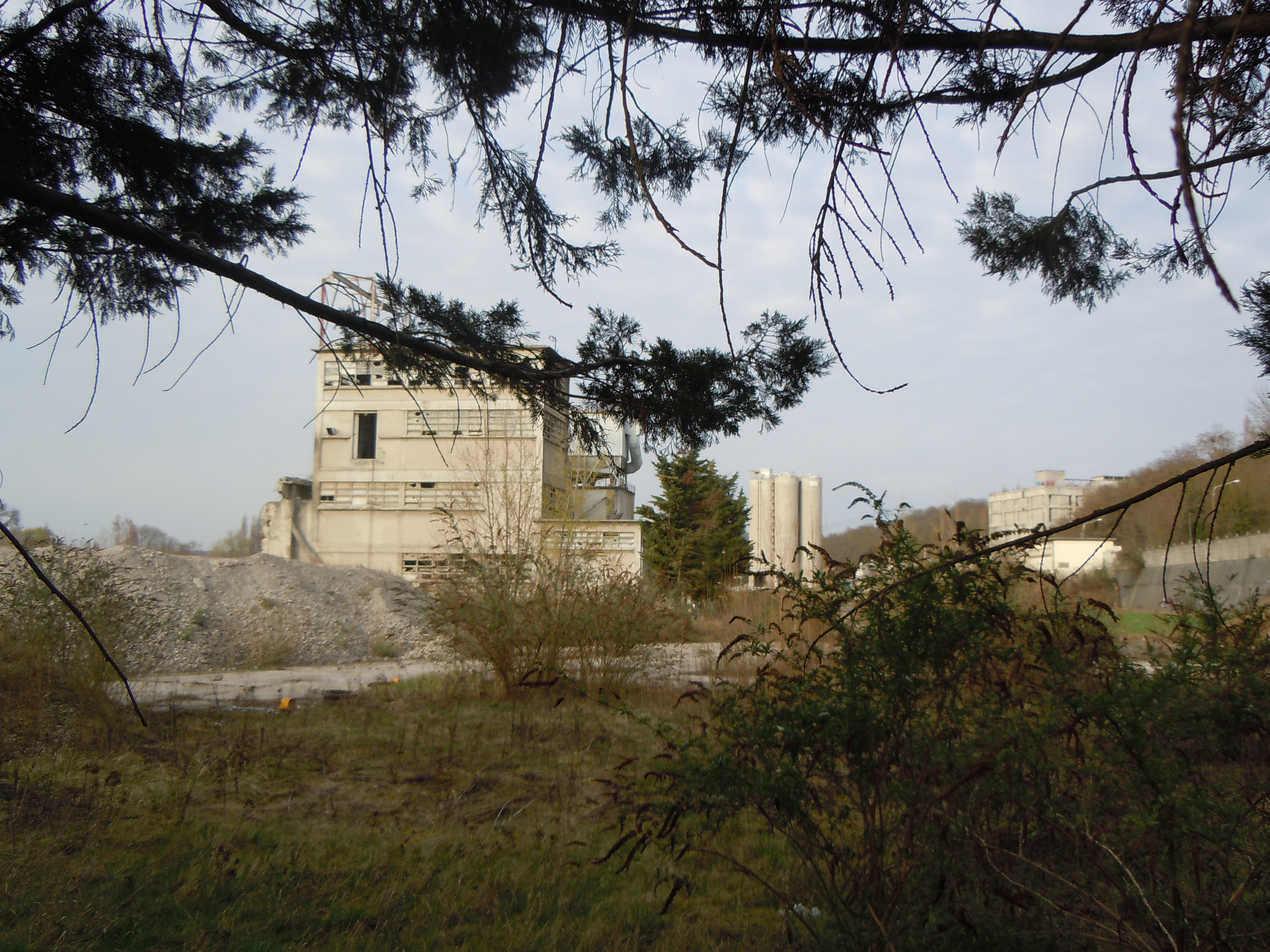 Cormeilles-en-Parisis - Friche industrielle de l'Usine Lafarge - arrétée en 1990.